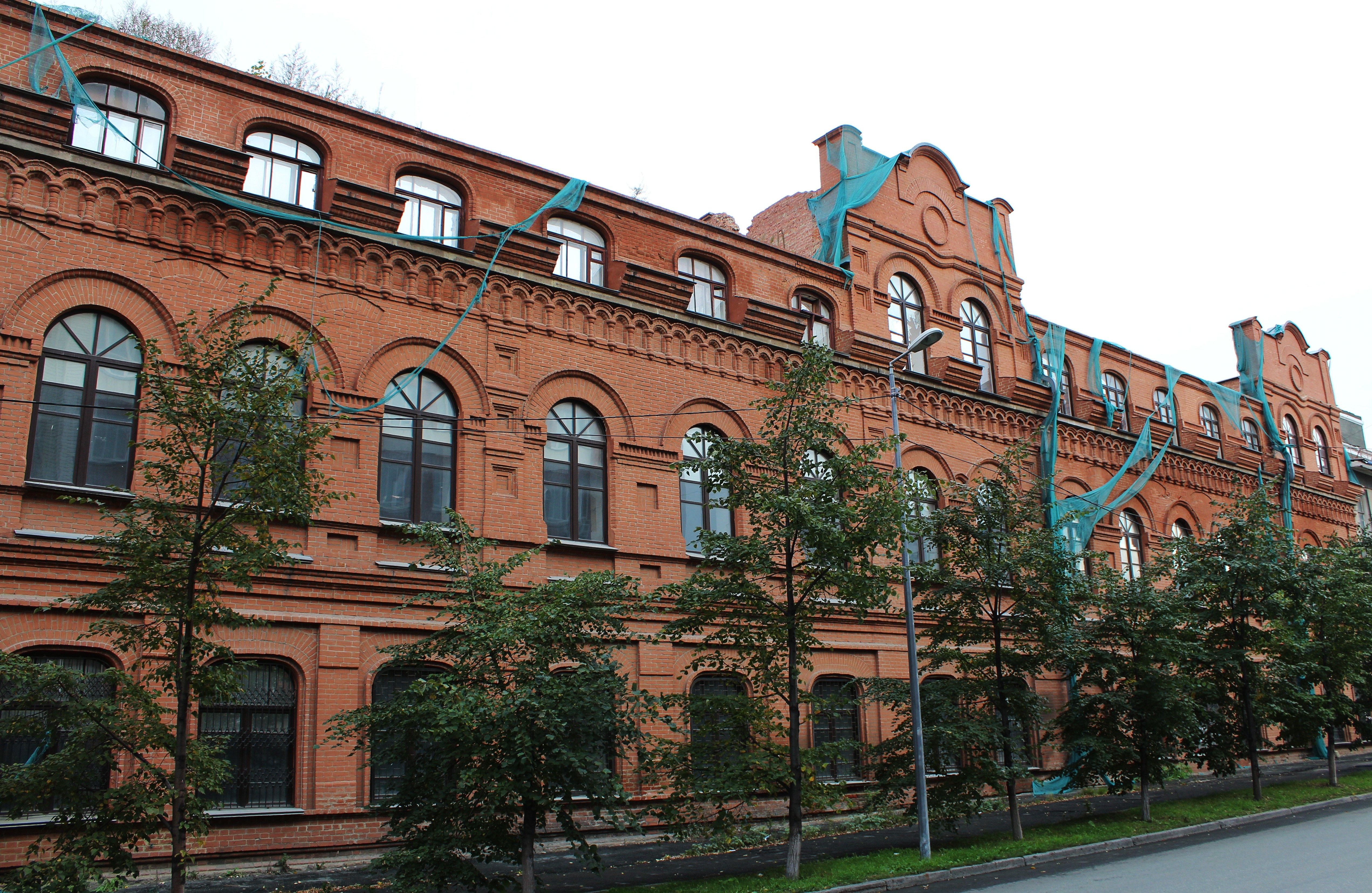 Чаеразвесочная фабрика Кузнецова (Челябинская область, Челябинск, Васенко улица, 37)